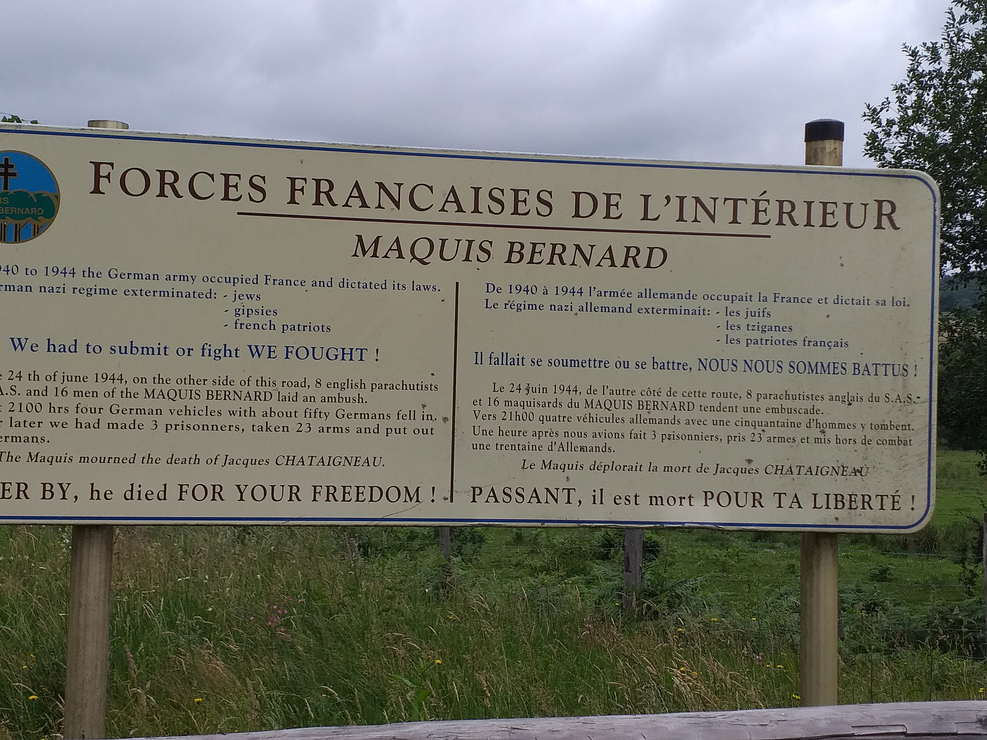 Panneau expliquant la motivation des membres du Maquis Bernard à "sauver la France du joug nazi"